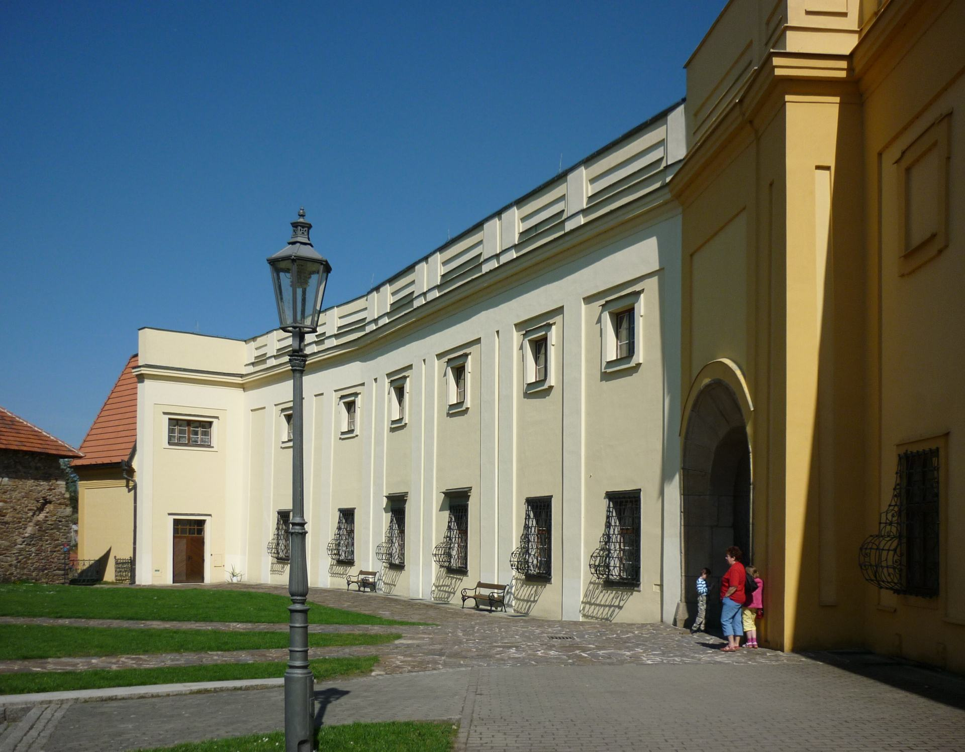 Zámek v Polné